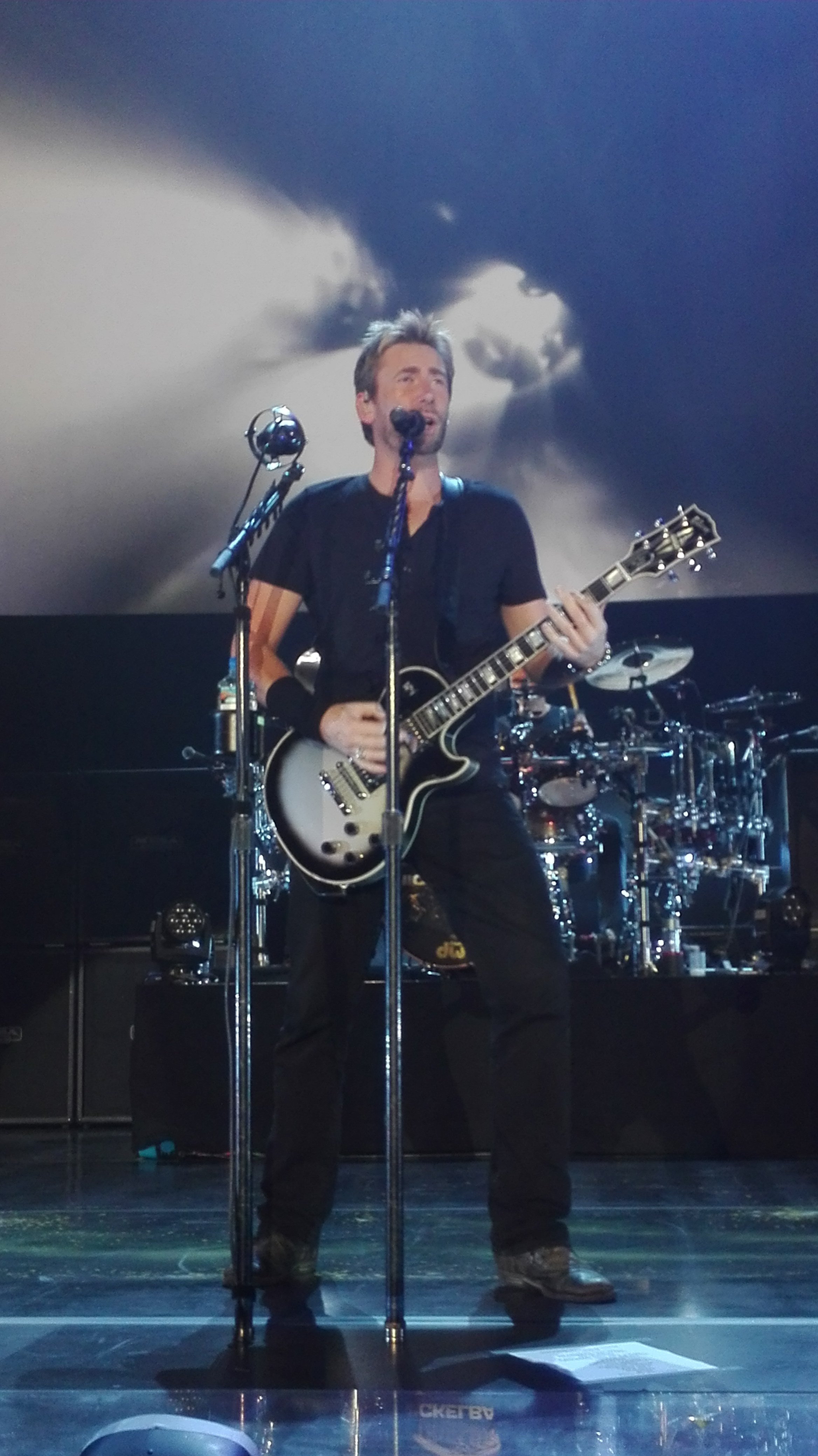 Chad Kroeger in concerto a Kaunas nel 2016